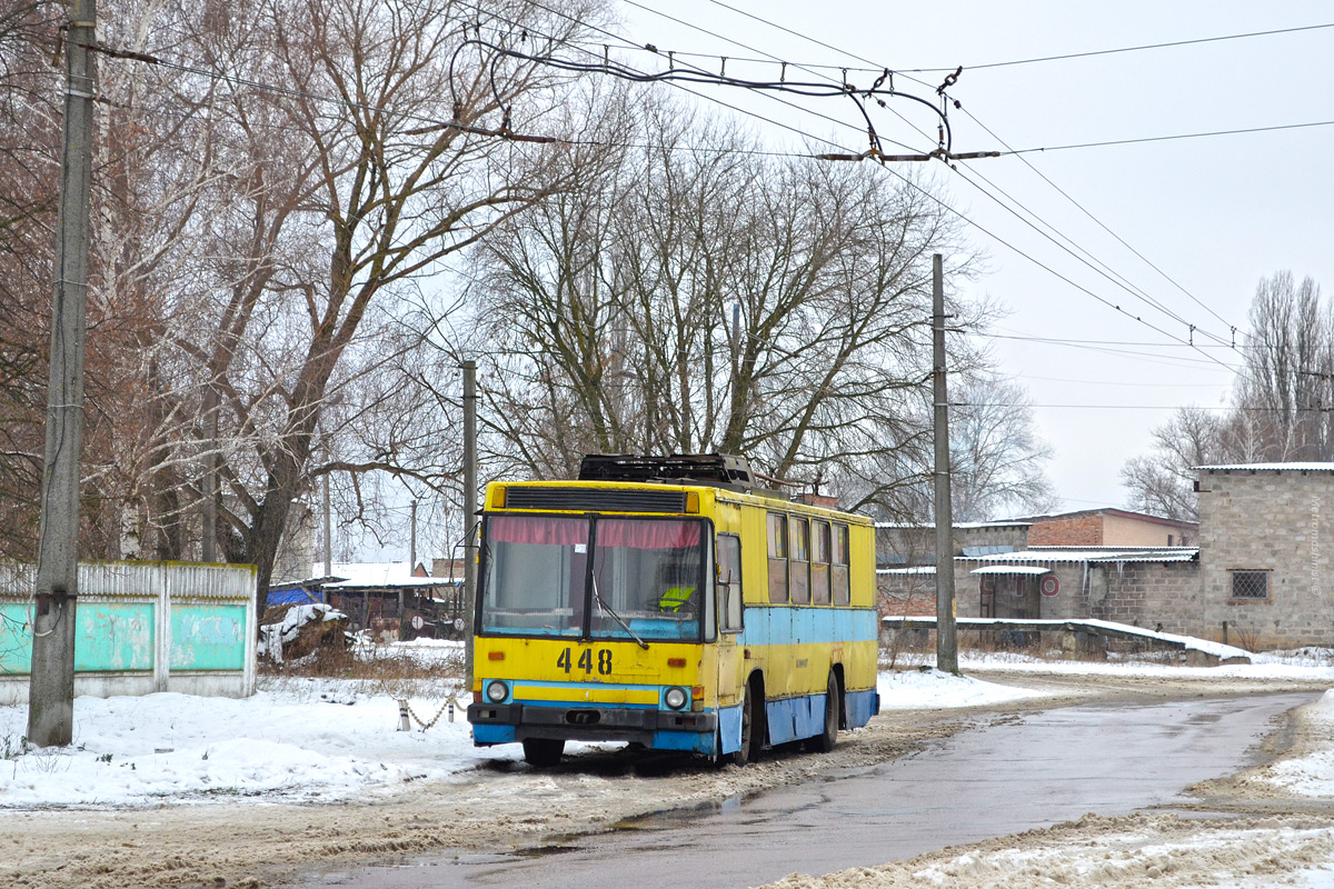 Киев-11у №448 "Комфорт"